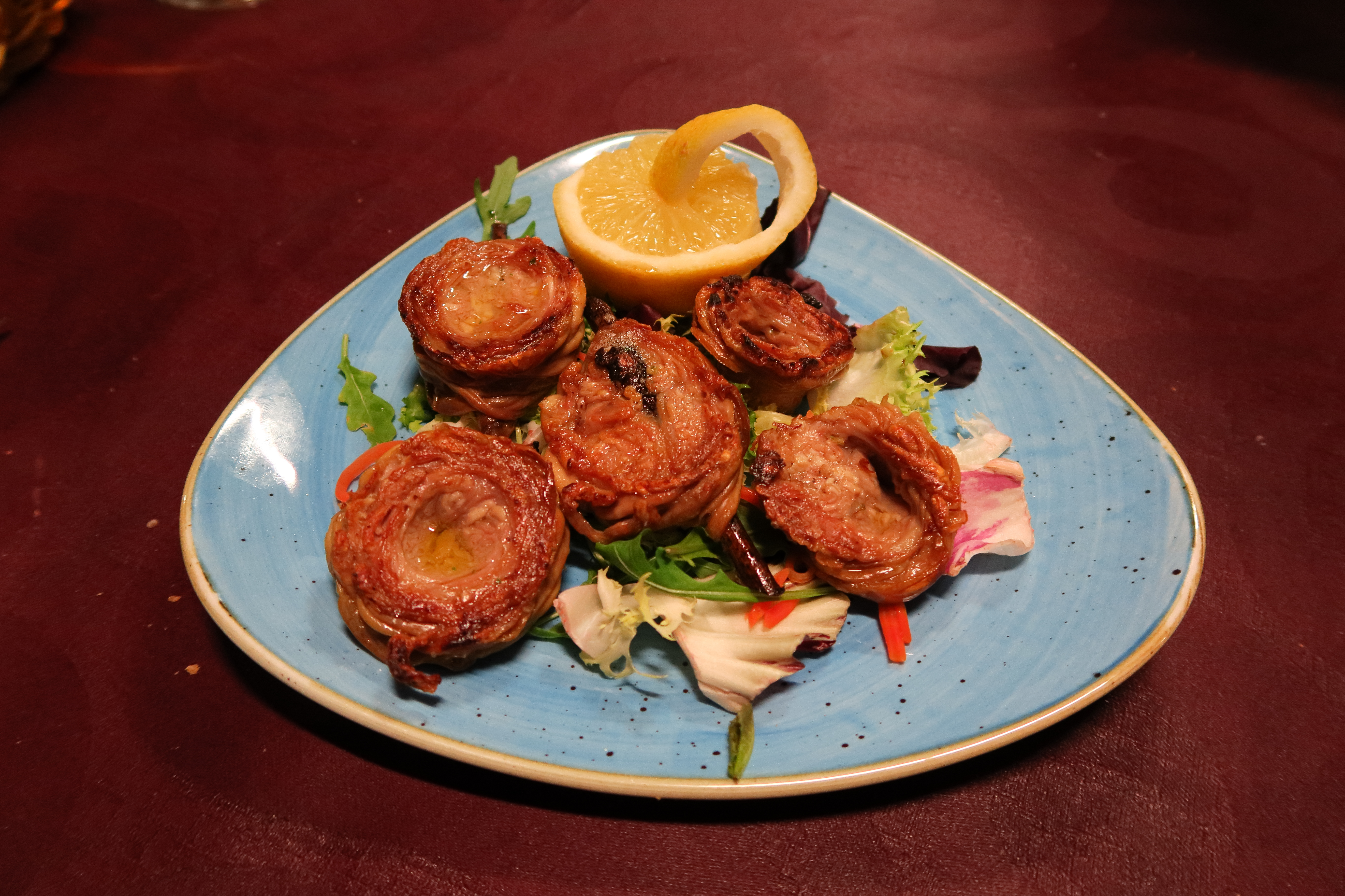 Zarajo, tapa típica de Cuenca